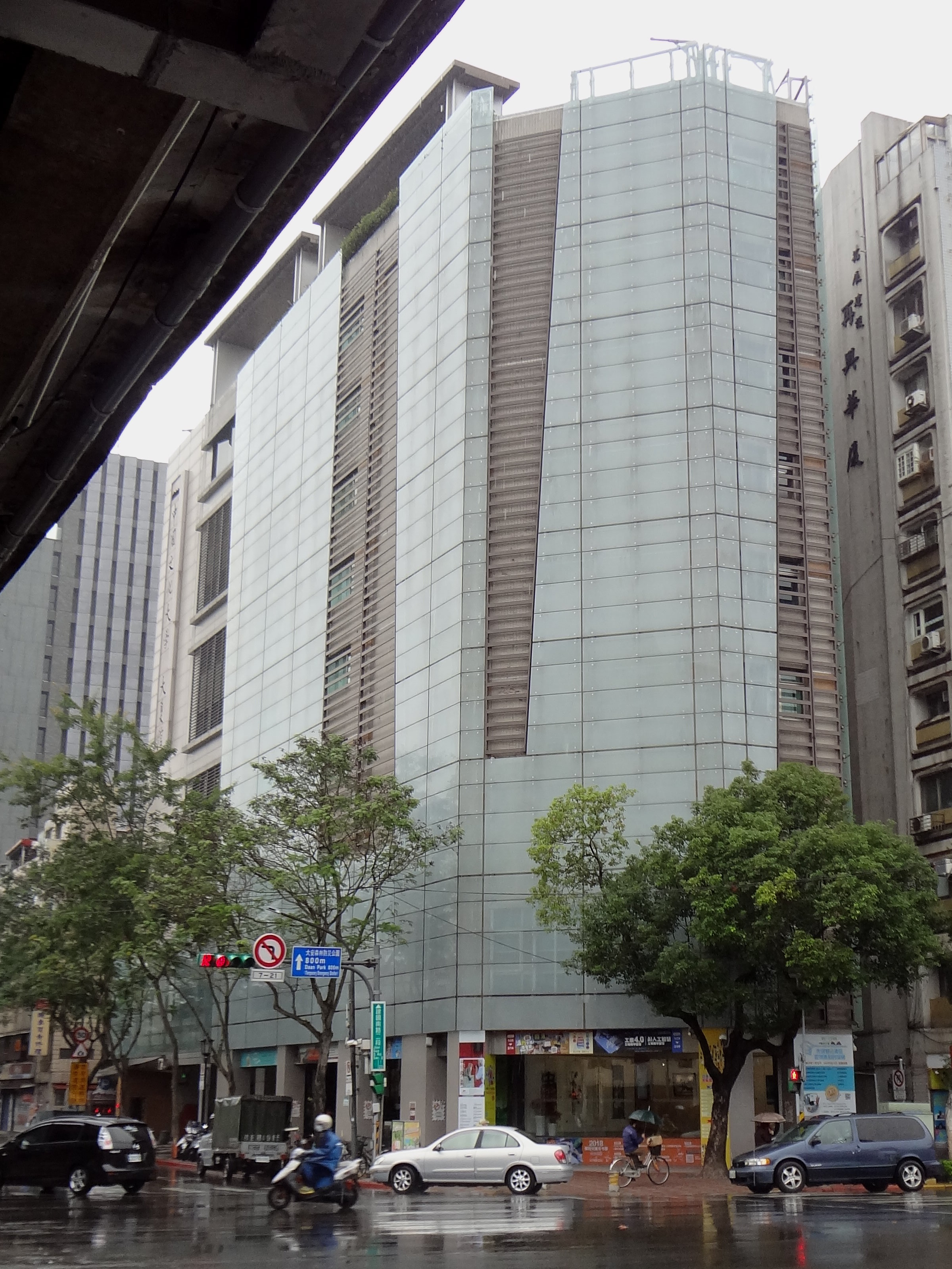 中國文化大學大夏館，位於臺北市大安區建國南路二段231號。